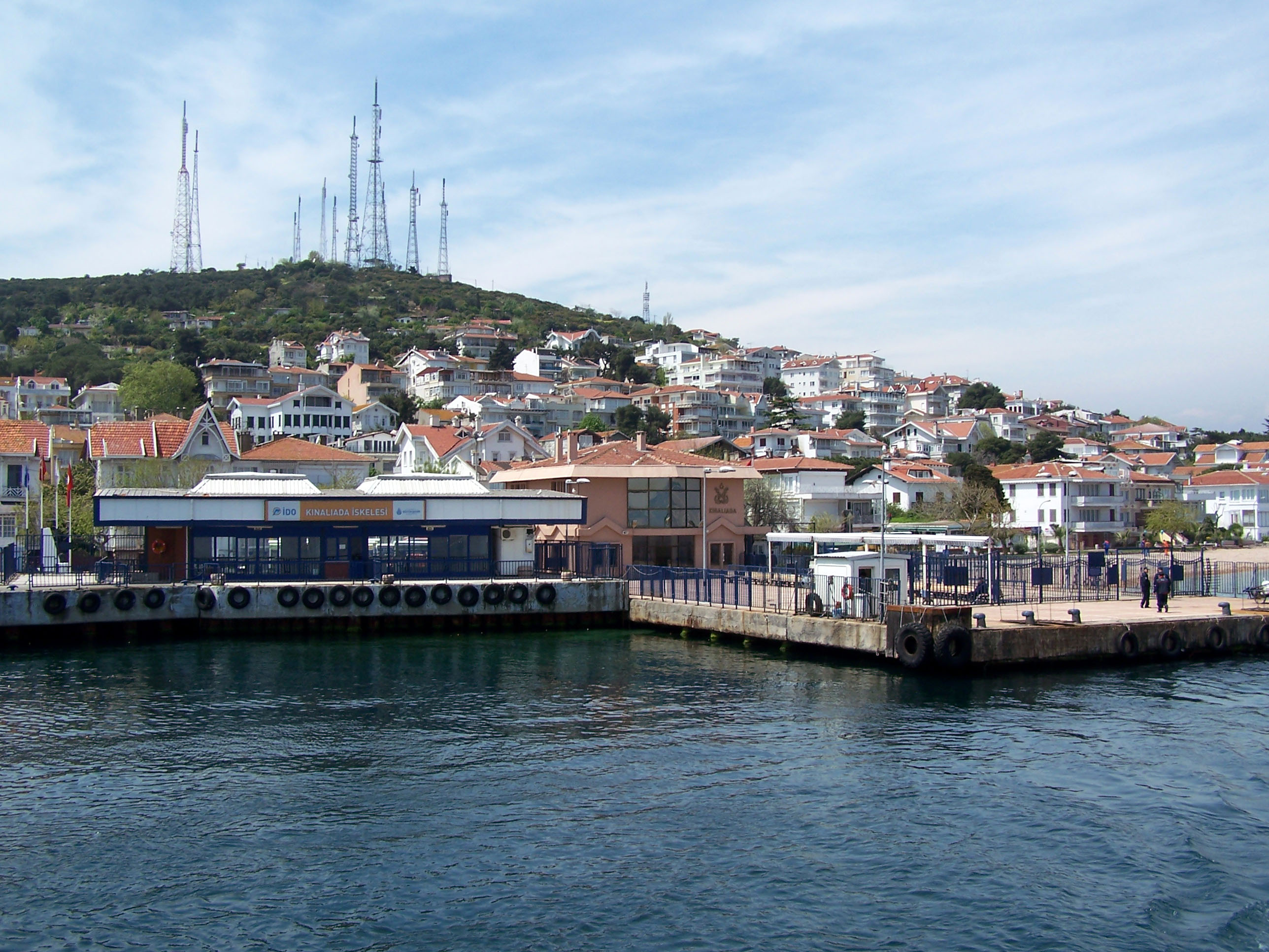 Ferry port of Kınalıada, Turkey